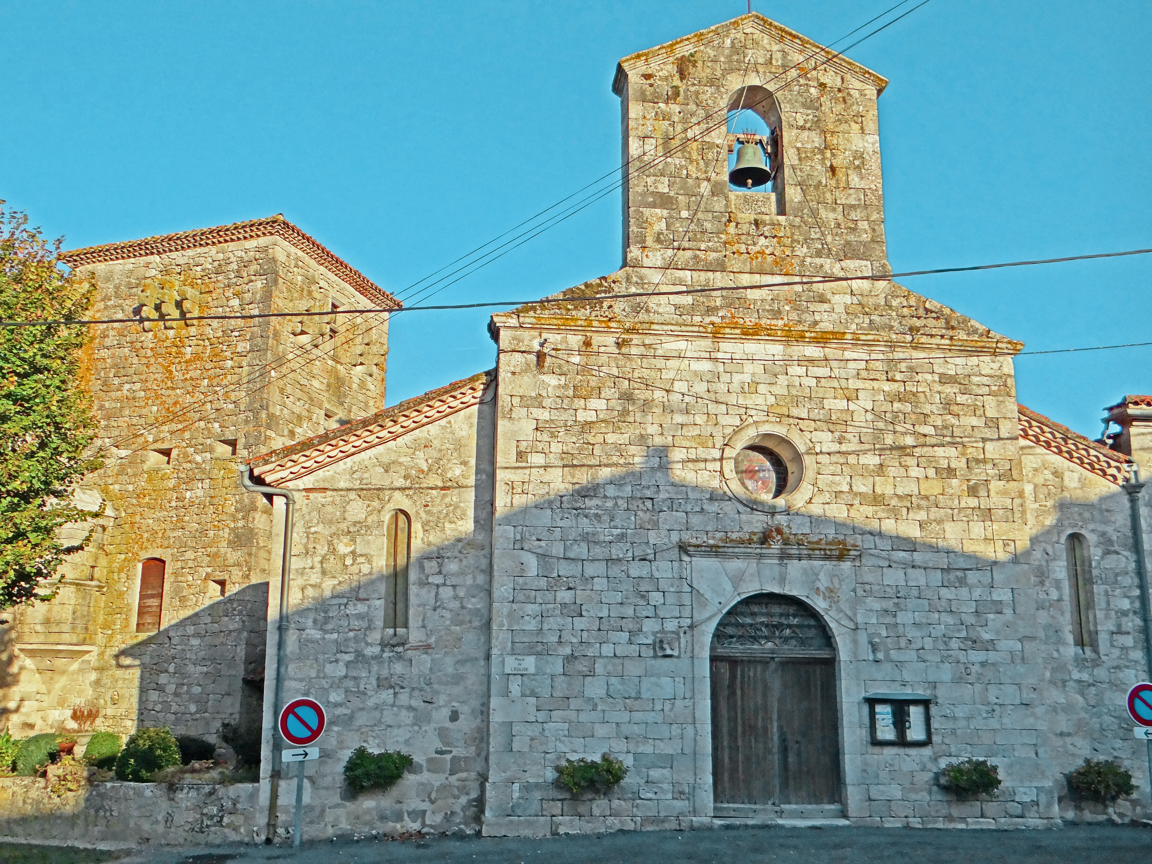 Laugnac (Lot-et-Garonne), France : L'église Saint-Vincent et la tour